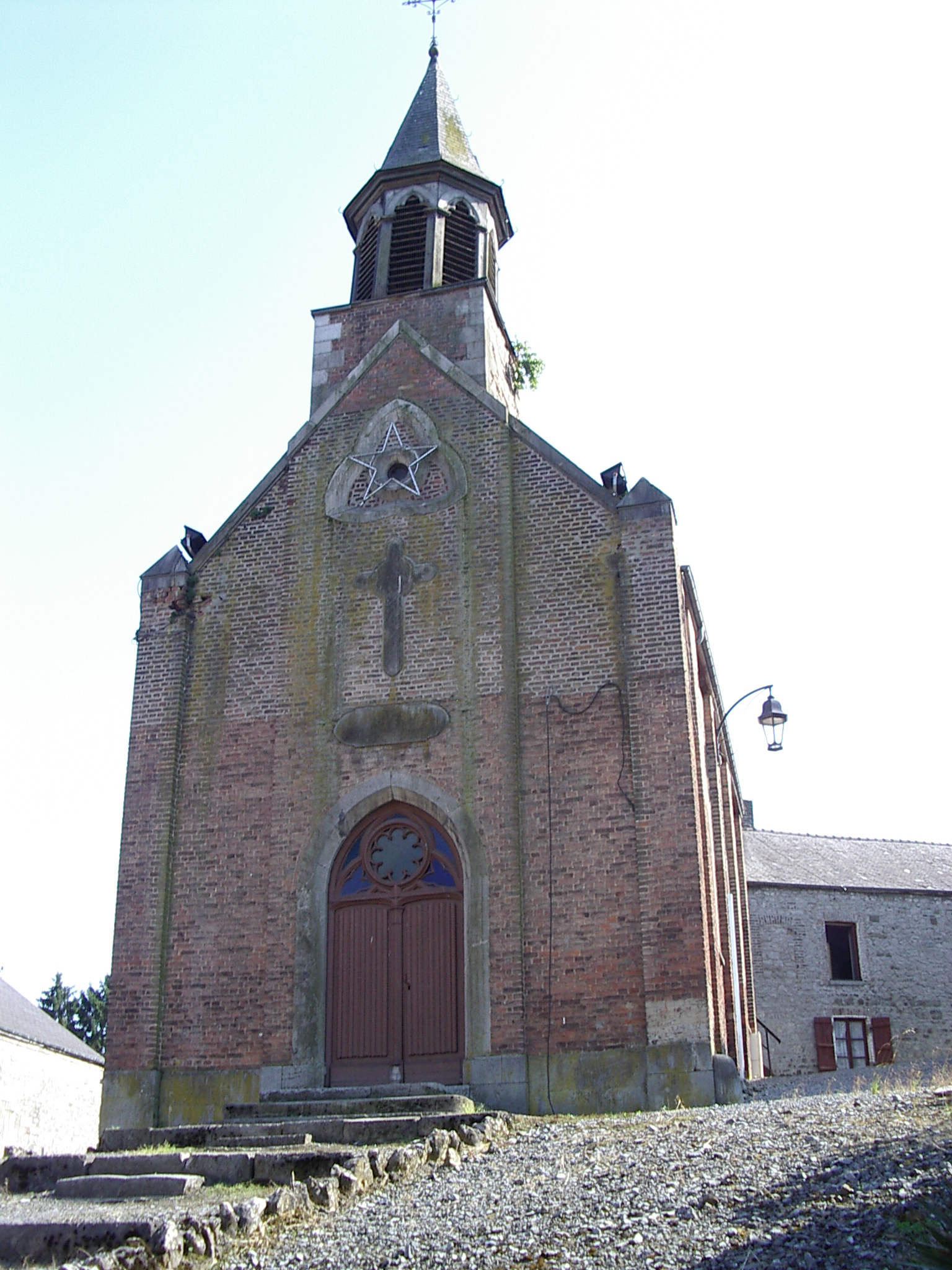 Eglise de hameau de Flohimont, Fromelesnnes, departement des Ardennes